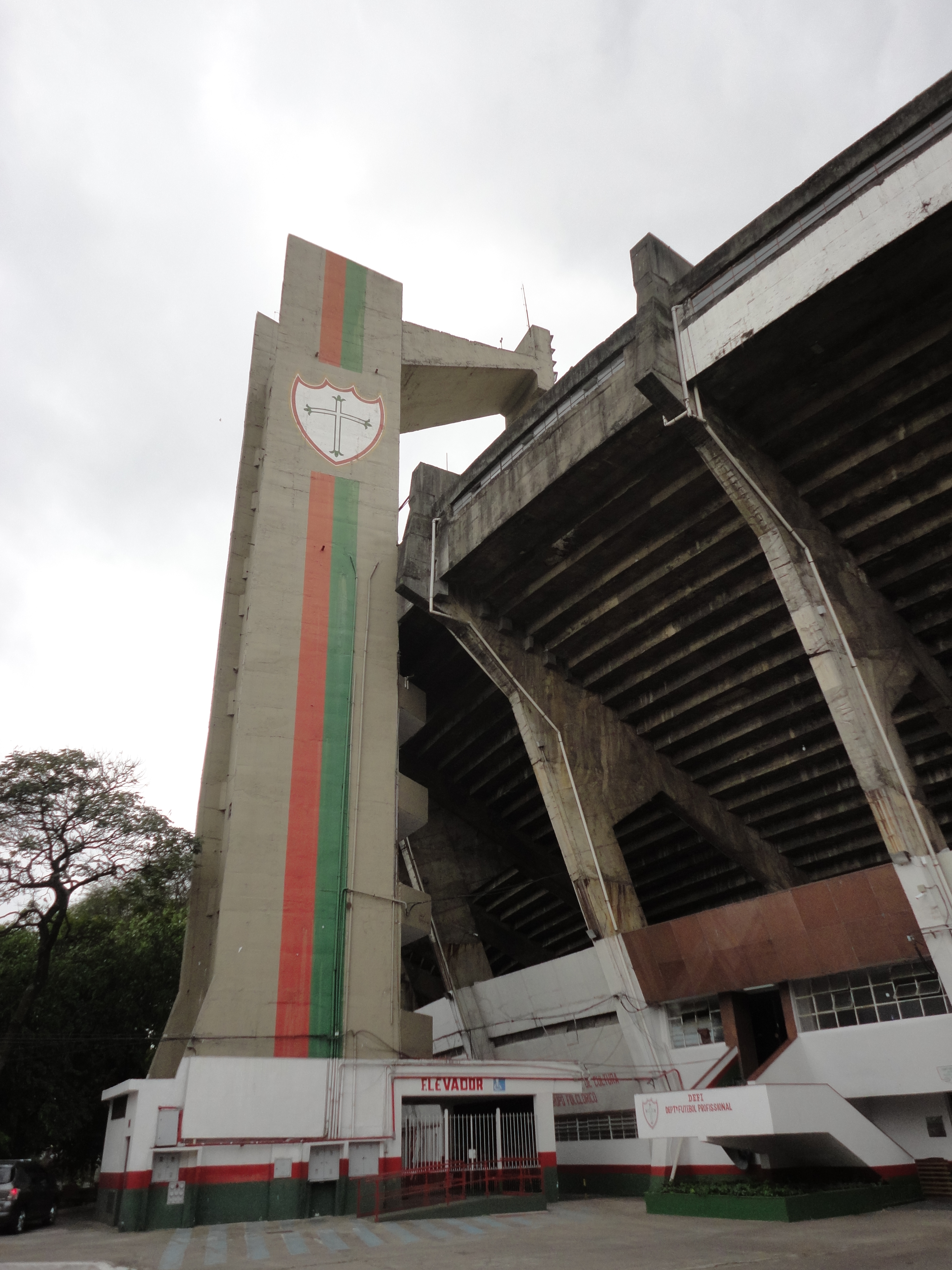 Vista de uma das torres do Canindé, em São Paulo, Brasil